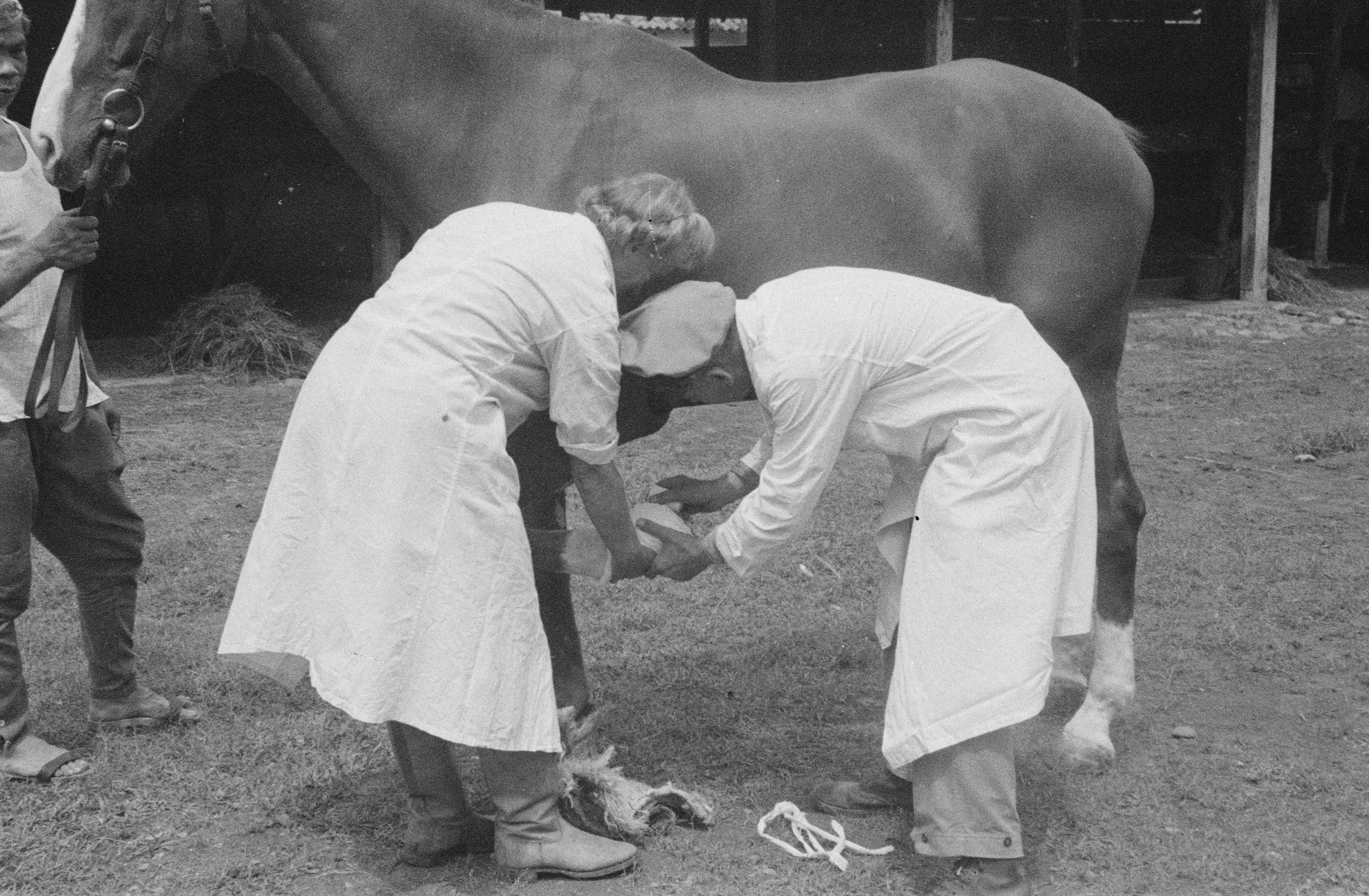 Collectie / Archief : Fotocollectie Dienst voor Legercontacten Indonesië Reportage / Serie : [DLC] Stallen van het 1e Parade Depot te Batavia Beschrijving : Verzorging van een paardenhoef Datum : 1946 Locatie : Indonesië, Nederlands-Indië Fotograaf : Fotograaf Onbekend / DLC Auteursrechthebbende : Nationaal Archief Materiaalsoort : Negatief (zwart/wit) Nummer archiefinventaris : bekijk toegang 2.24.04.03 Bestanddeelnummer : 3-3-4